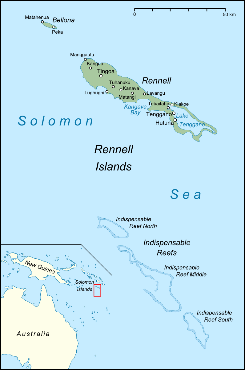 Karte der Inseln Rennell und Bellona, sowie der Indispensable Reefs im Süden der Salomonen